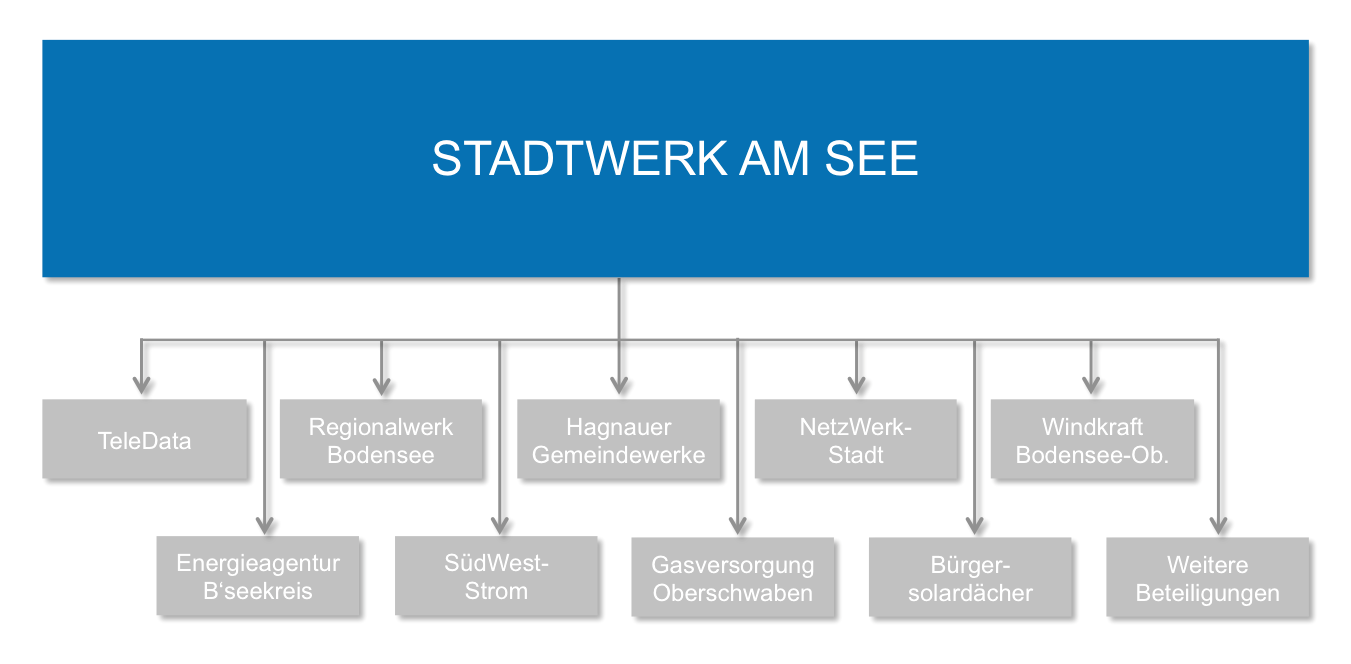 Beteiligungen der Stadtwerk am See GmbH & Co. KG